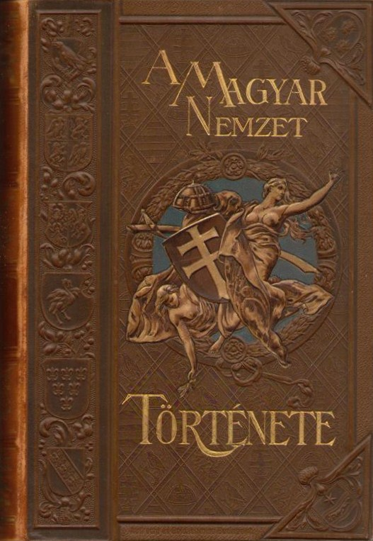 Szilágyi Sándor: A magyar nemzet története c. könyv borítója